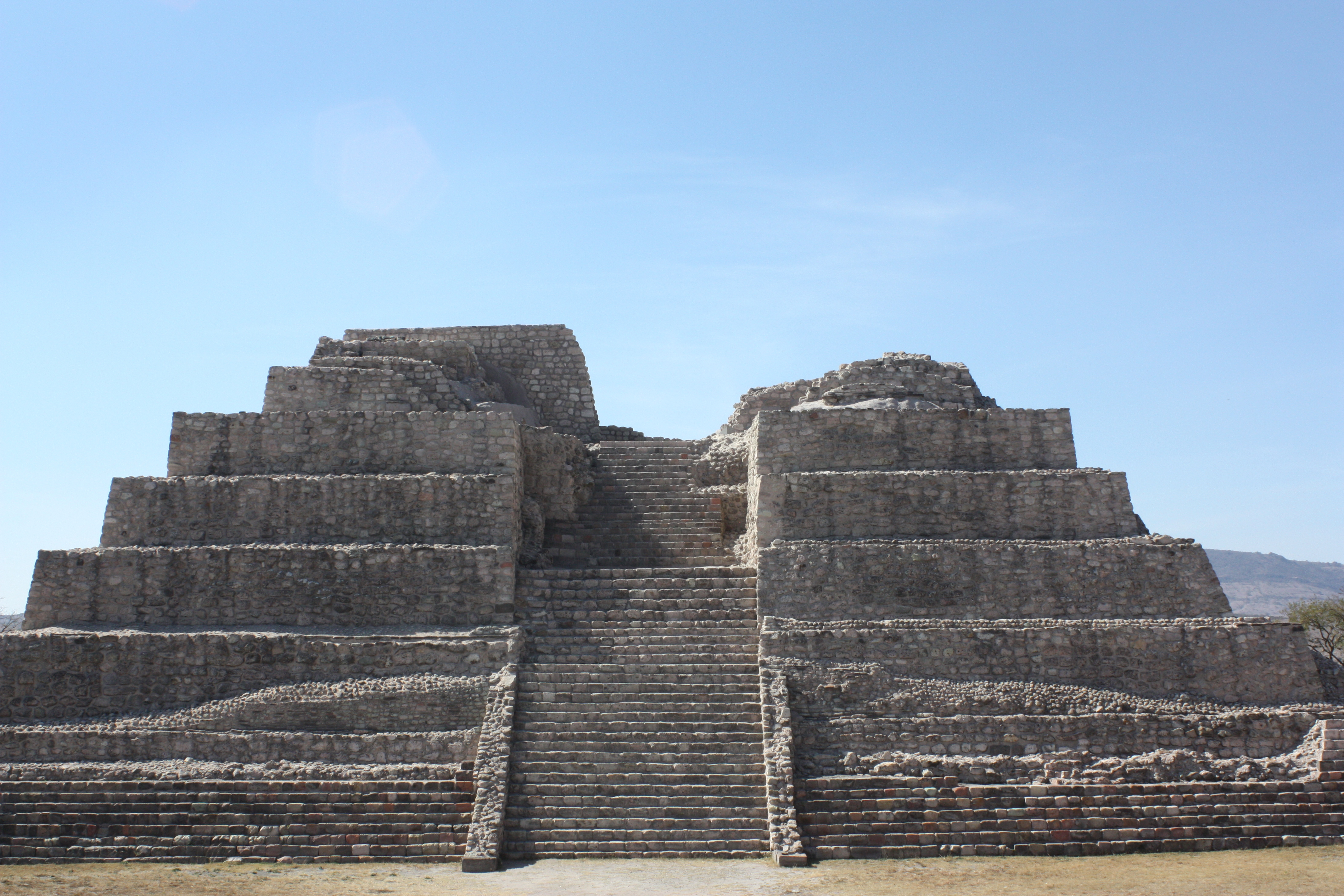 san miguel de allende, guanajuato, méxico